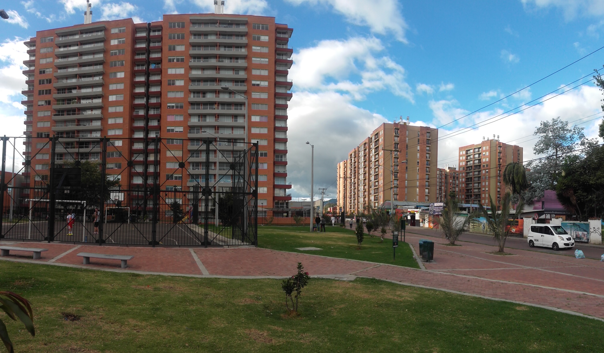 barrios